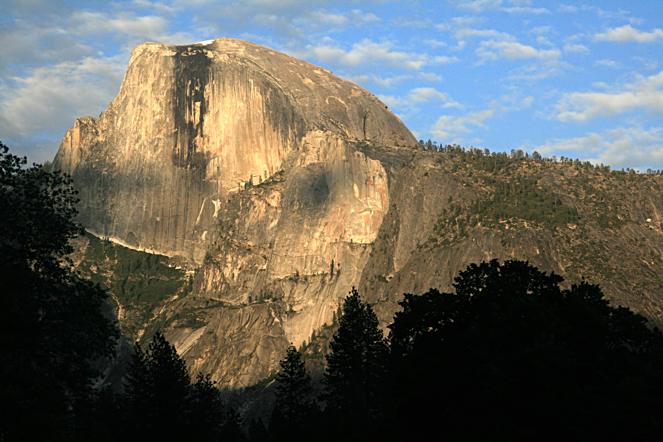 Half Dome at sunset